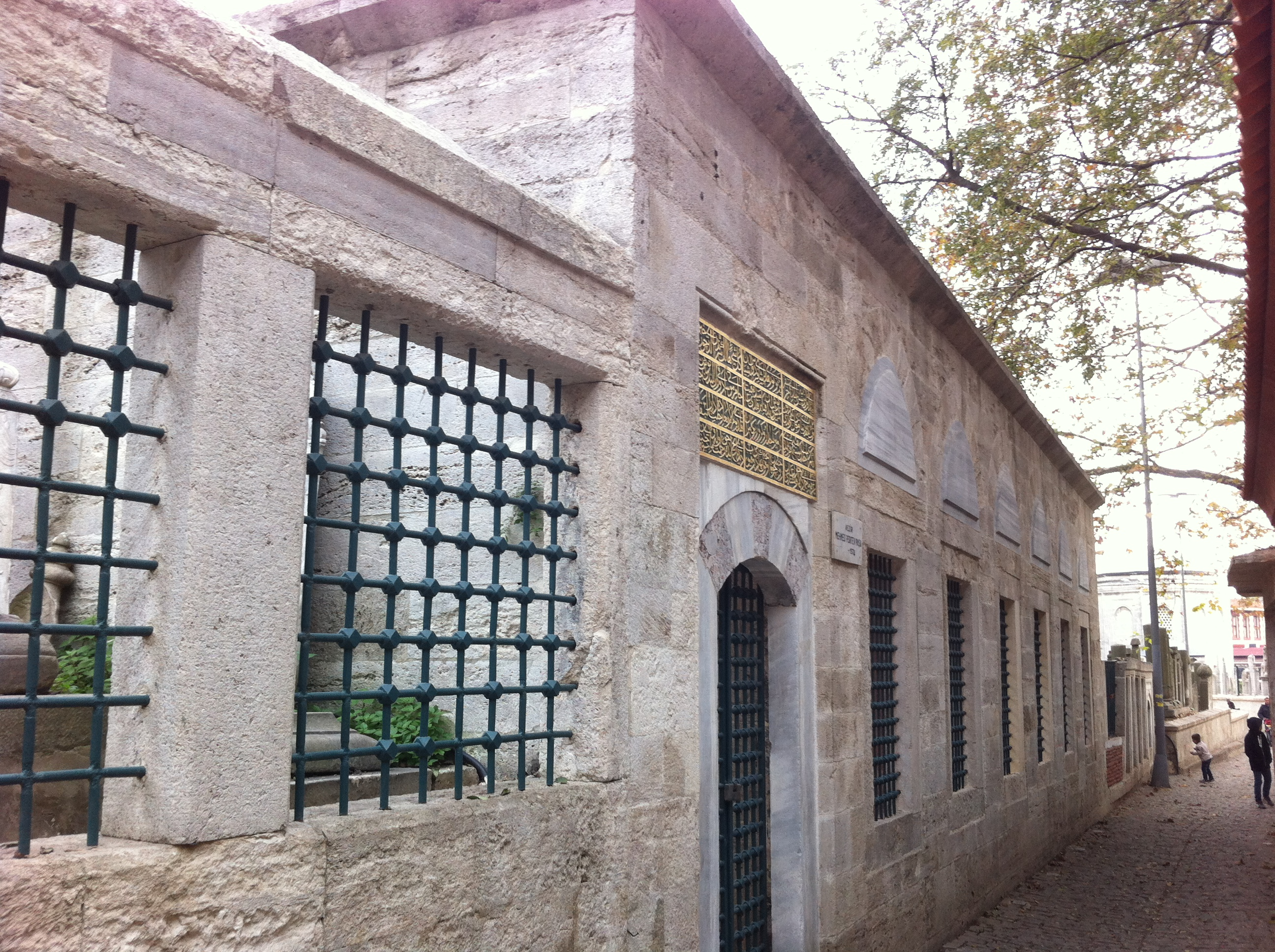 Vezir Mehmed Pertev Paşa Türbesi-Eyüp